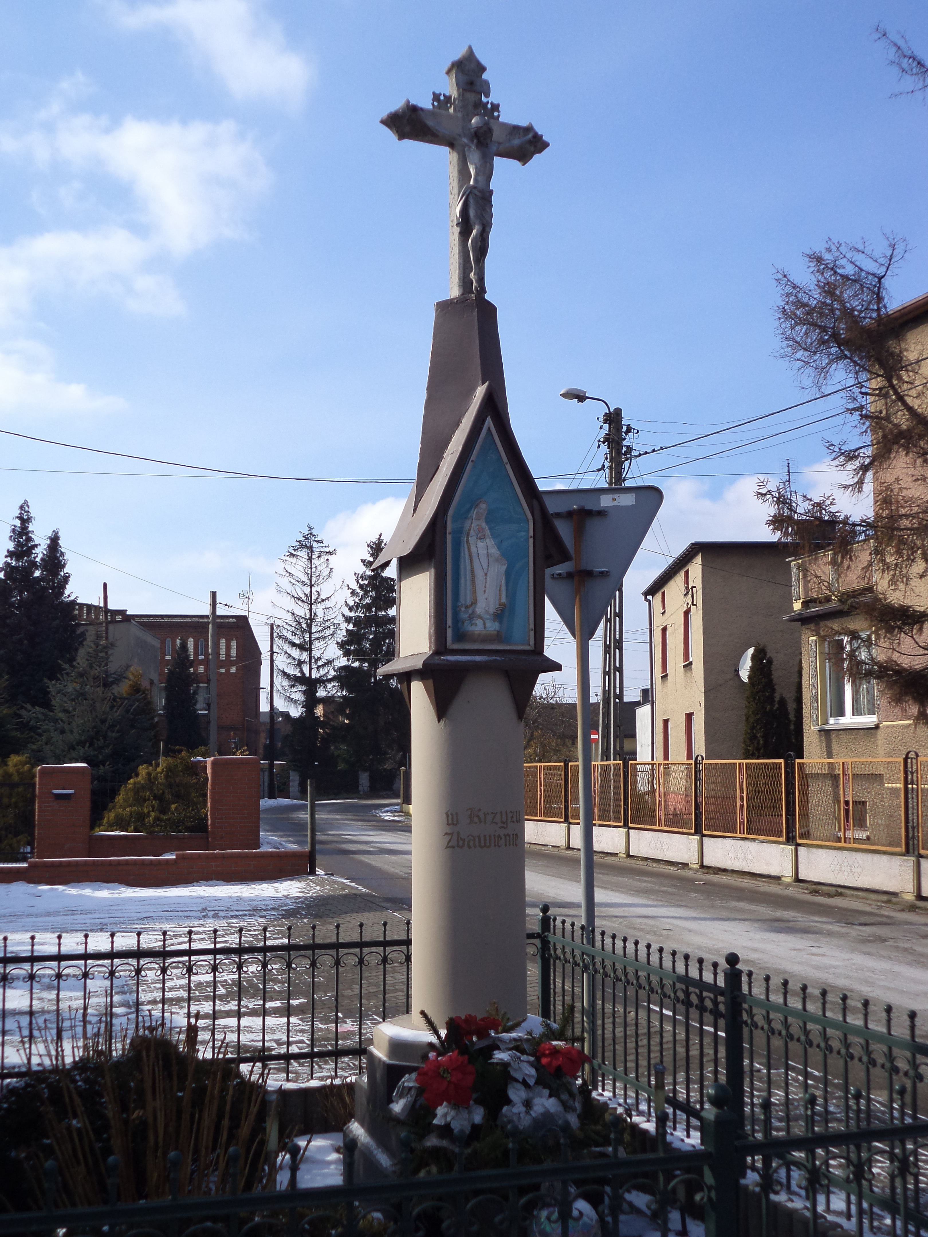 Krzyż przydrożny z 1913 u zbiegu ulic Korola i Topolowej w Tarnowskich Górach-Bobrownikach Śląskich